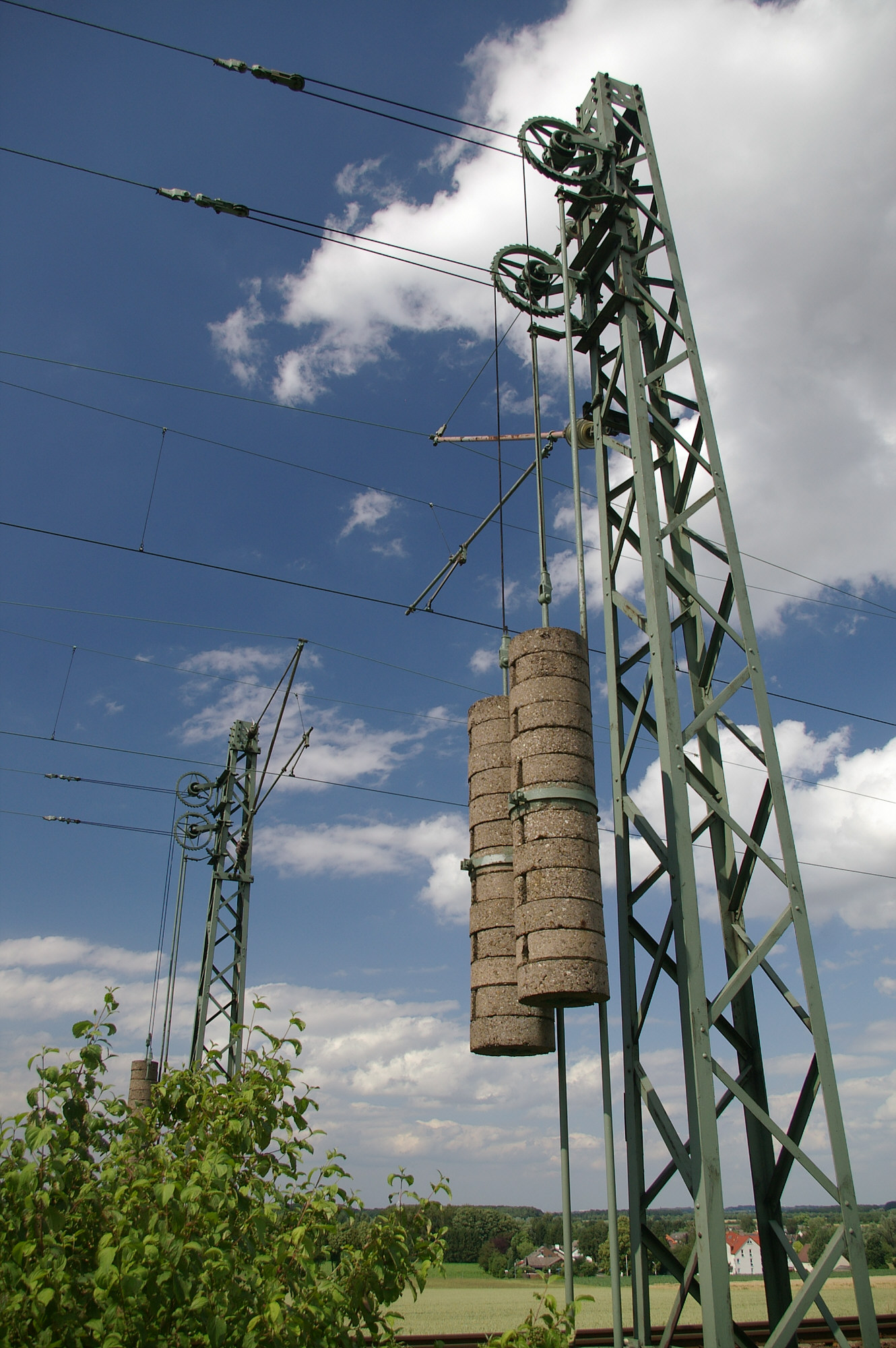 Radspanner mit Zuggewichten an einem Oberleitungsmast